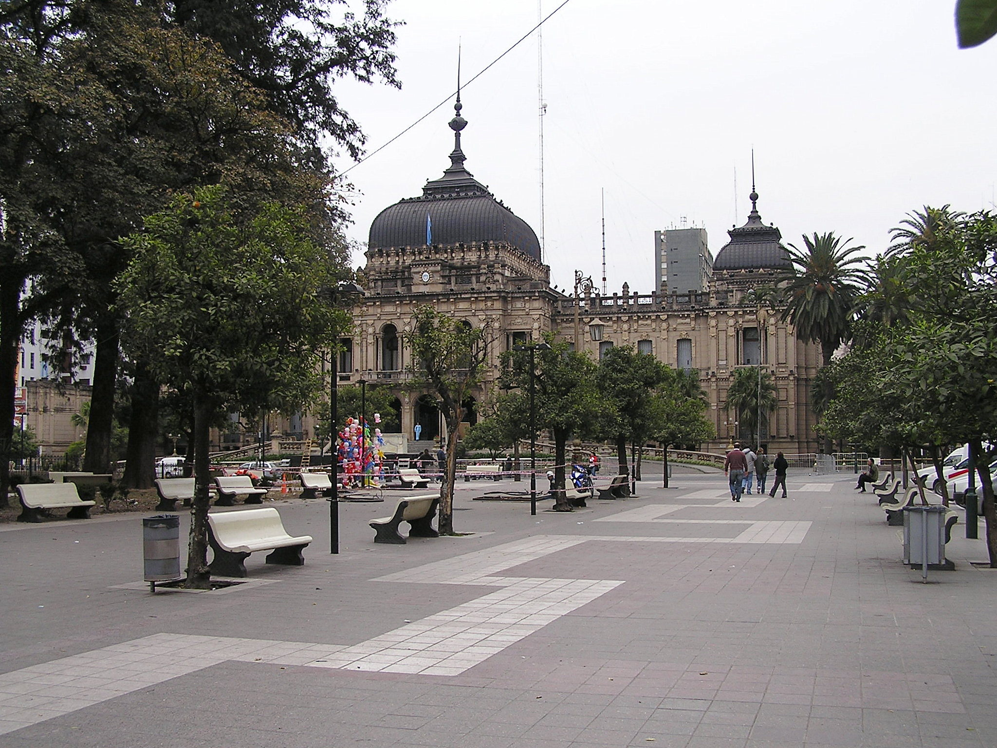 Vista de la plaza y la gobernación